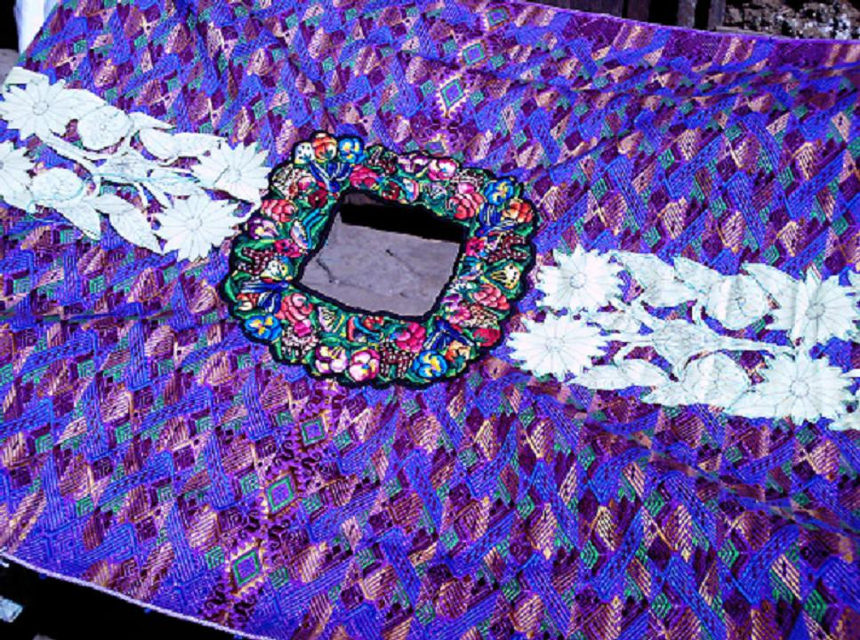 Güipil elaborado artesanalmente en San Pedro Sacatepéquez, San Marcos, Guatemala.